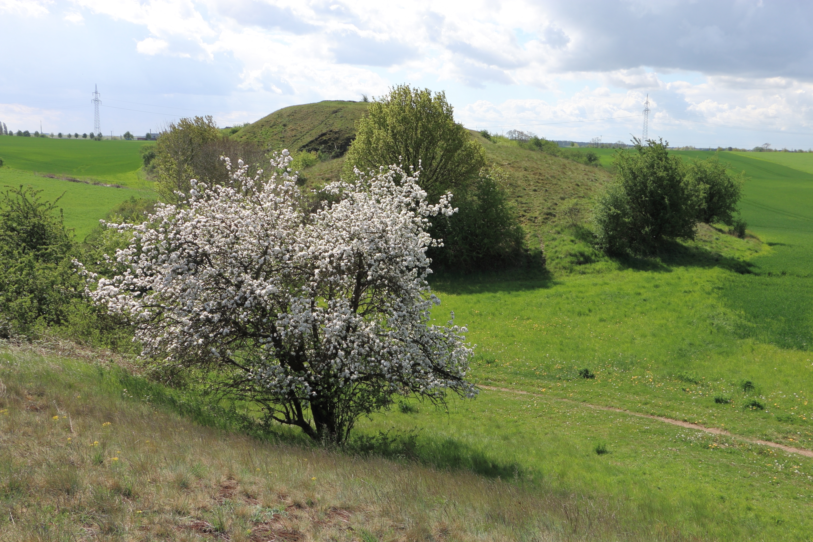 NSG Lunzberge (NSG0139) im LSG Saale; Frühlingswiese im Trockenrasengebiet der Lunzberge im Unteren Saaletal mit blühendem Apfelbaum; Halle (Saale).